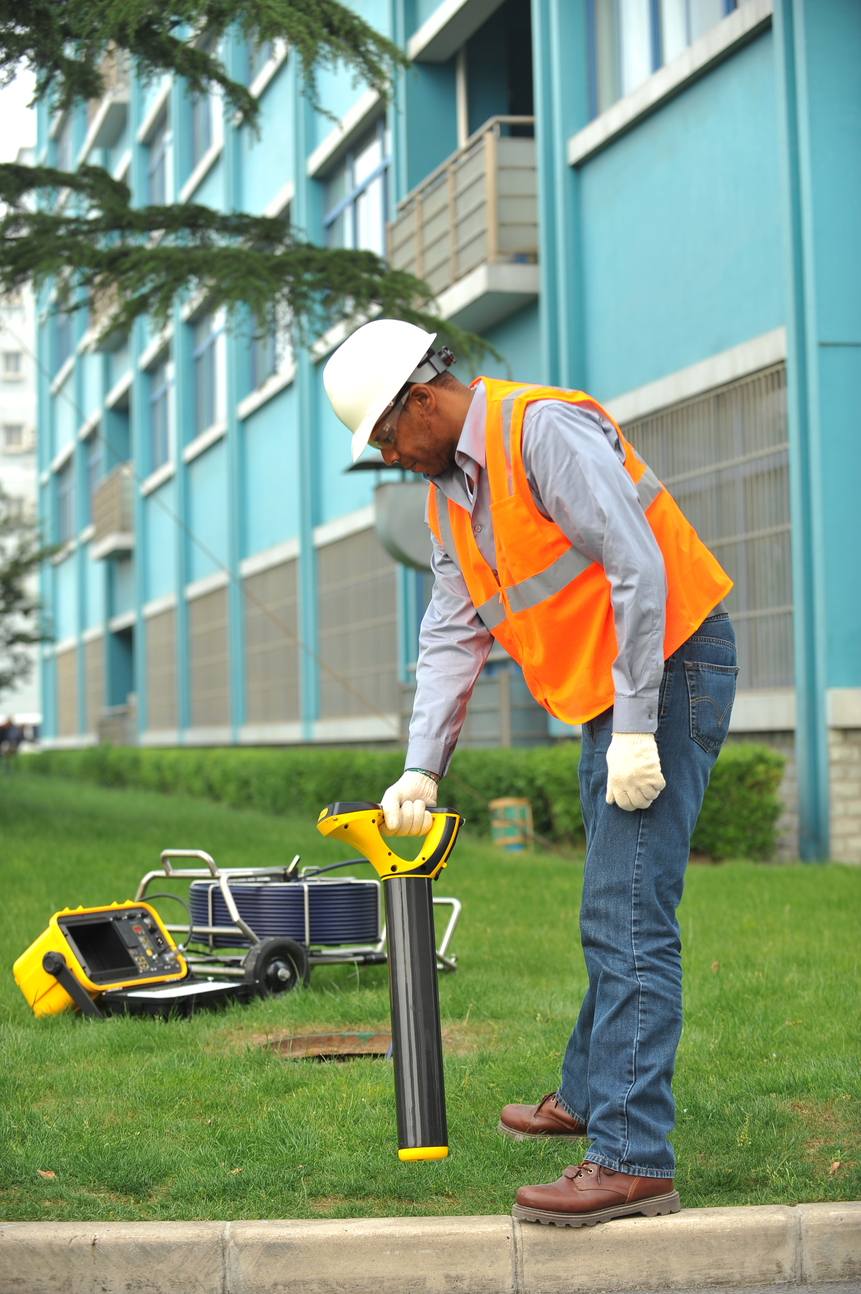 SebaKMT: Ortungssystem vLoc Pro 2 im Einsatz (Kabelfehlerortung).